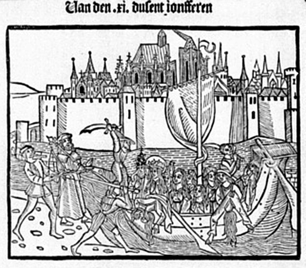 Köln, Das Maryrium der Hl. Ursula, 1499, Holzschnitt